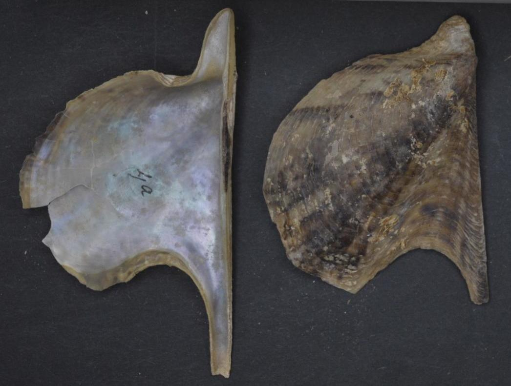 Pteria hirundo (Linnaeus, 1758)